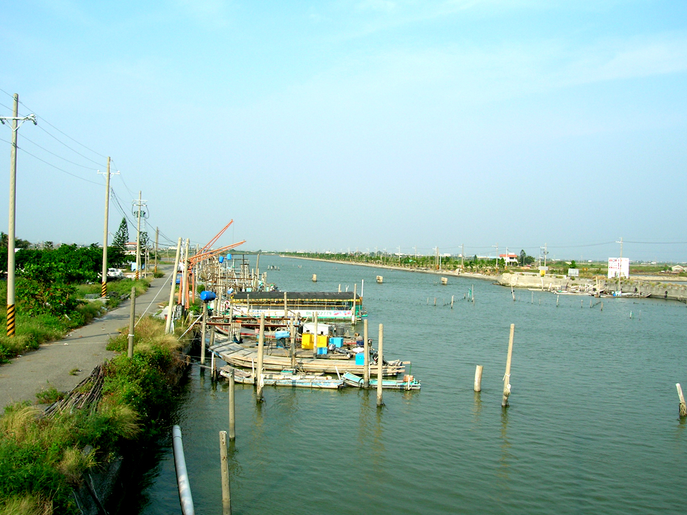 水試所一號橋殘跡（拍攝地點：七股鄉海寮，海寮東橋上往東拍攝）